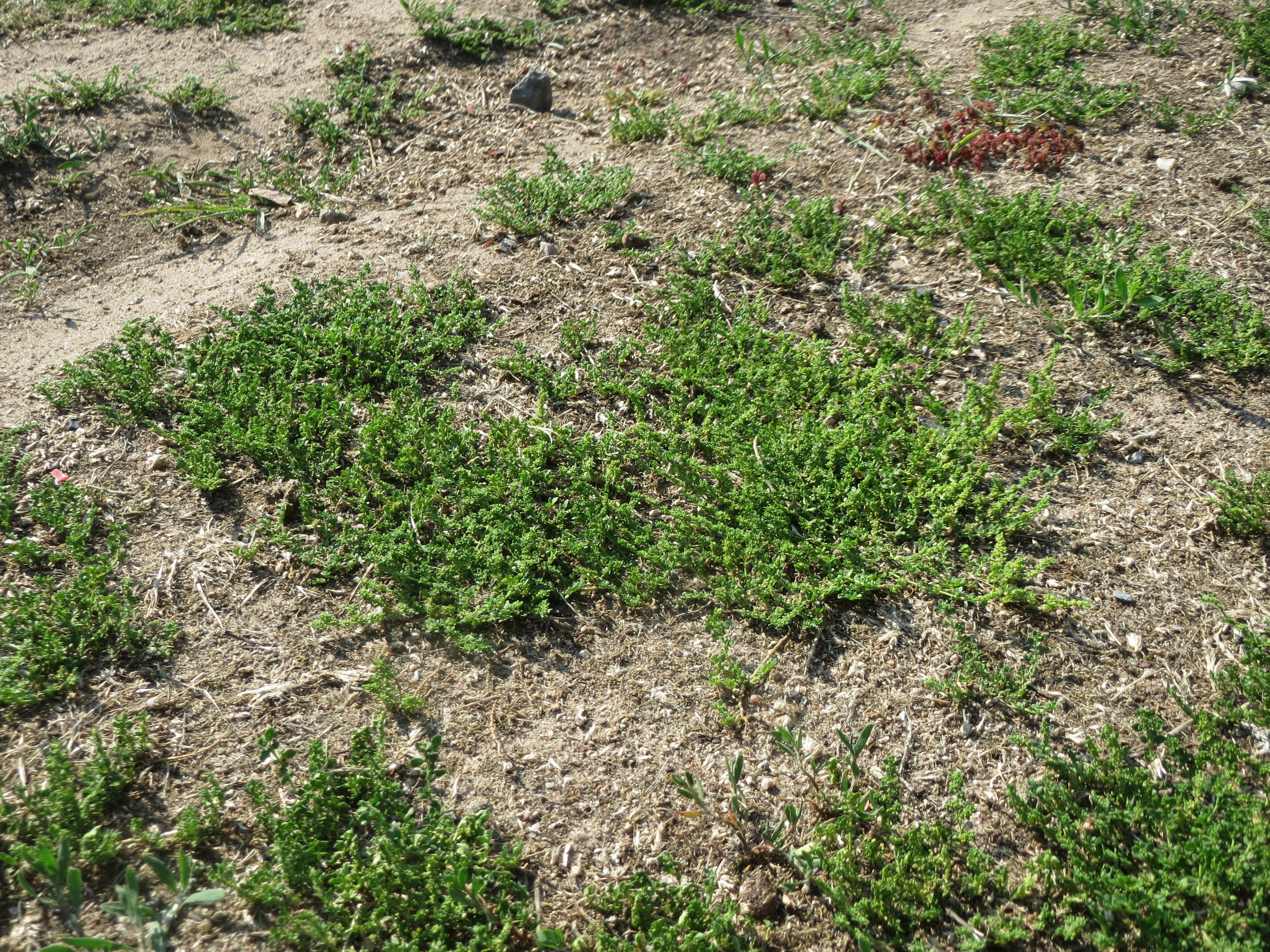 Kahles Bruchkraut (Herniaria glabra) an natürlichem Standort auf einer Sand-Rasenfläche bei Hockenheim